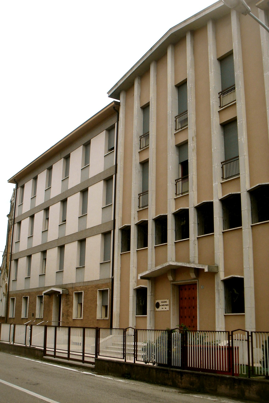 San Fior, TV: facciata del Santo Volto, fondato dalla beata M. P. Mastena